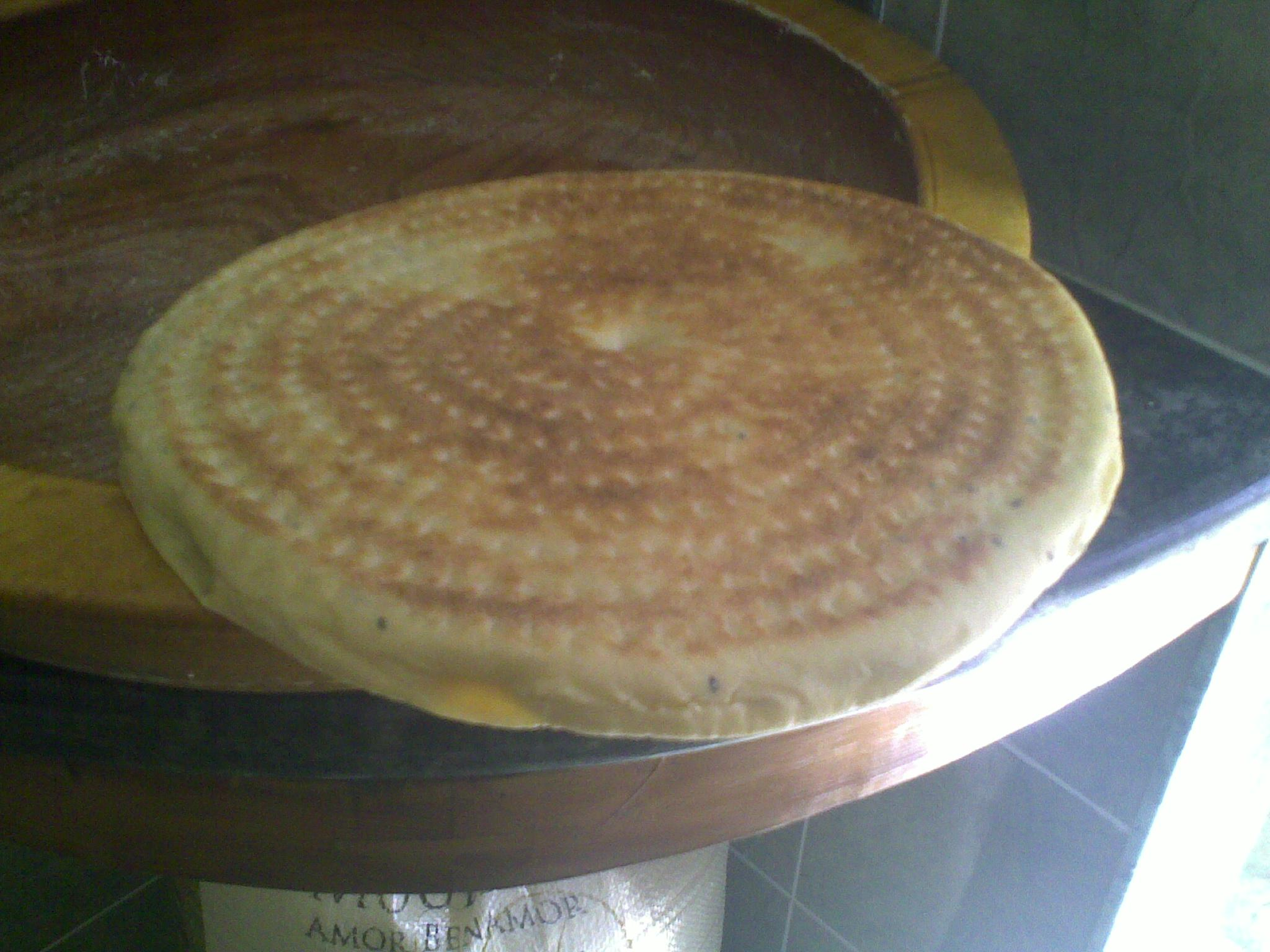 La Kesra prête à manger. de Batna